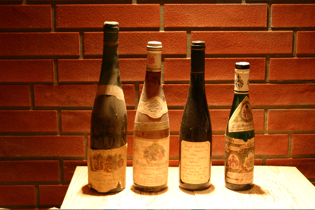 v.l.: 1949er Riesling, klassische deutsche Schlegelflasche, 0,5l Flasche, halbe Flasche